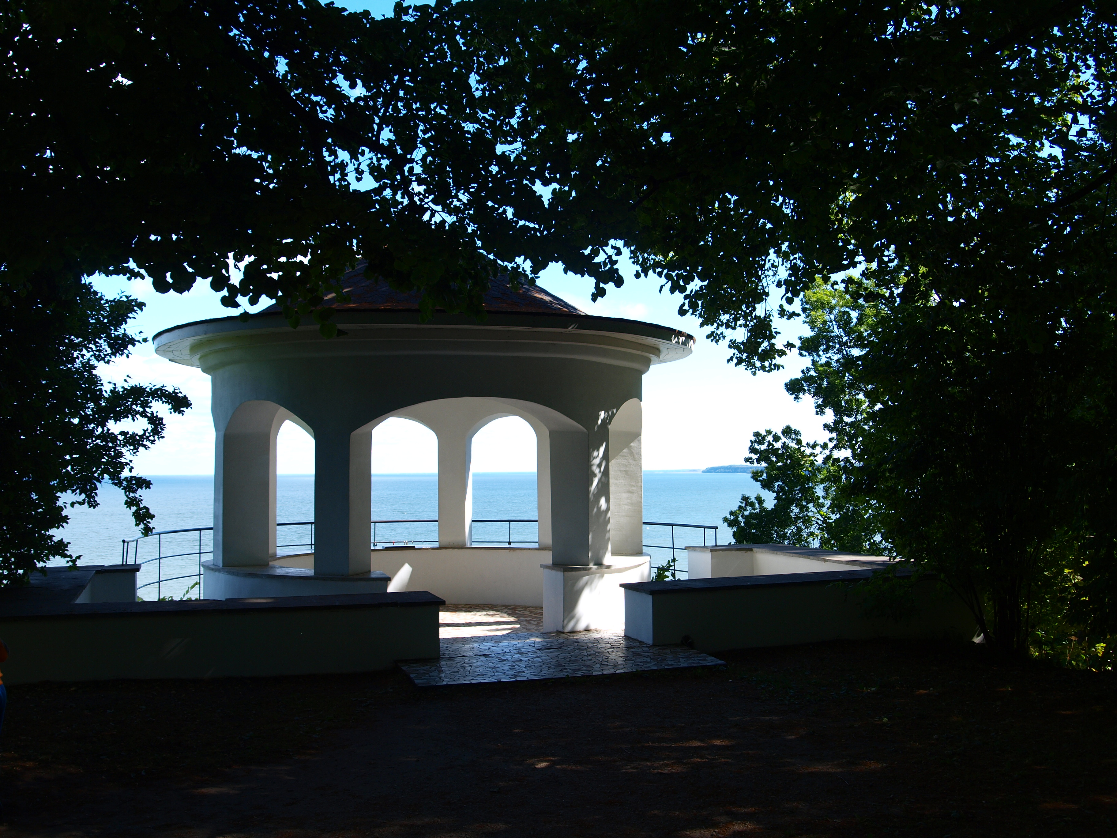 Nõiametsa paviljon Toila-Oru pargis